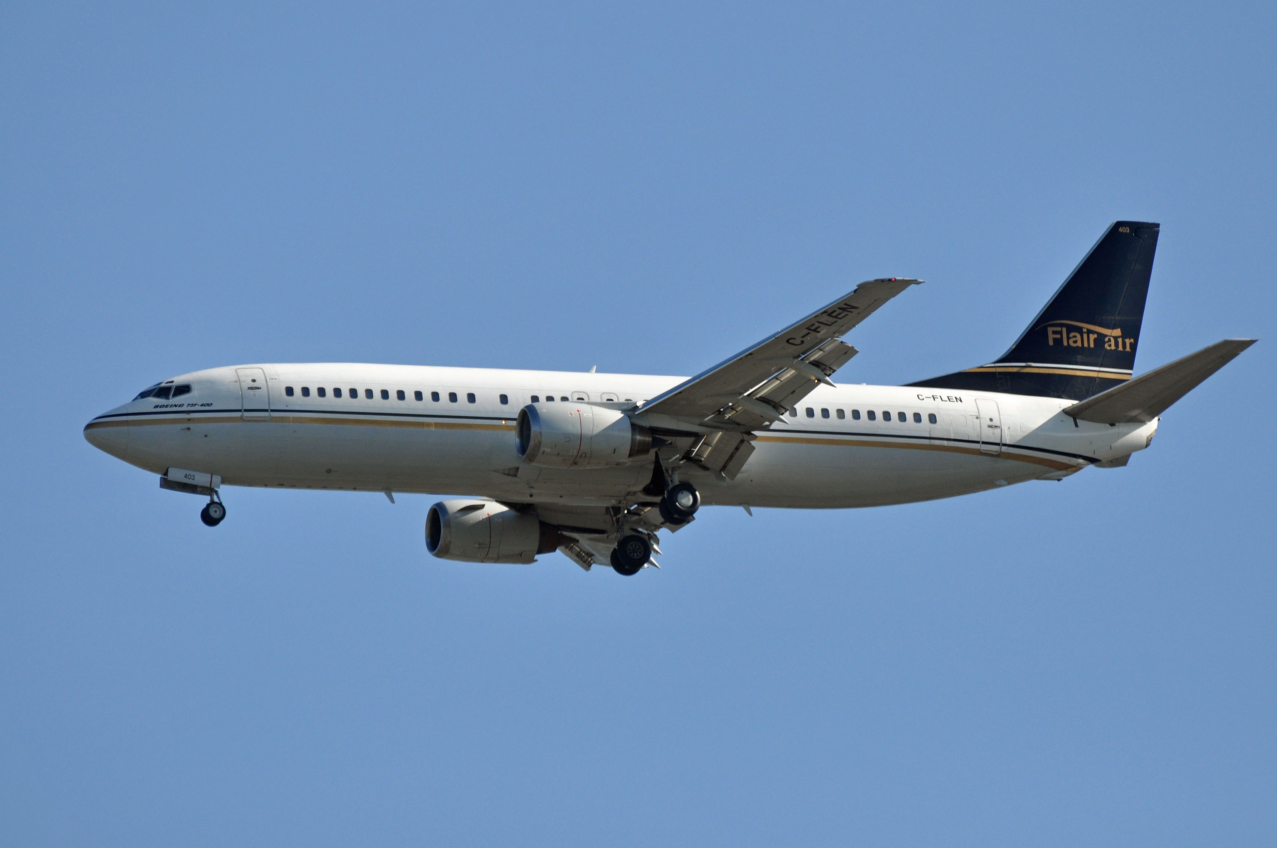 MSN 24769 LN 1839 B737-4K5 / 737 / 737-400 FLAIR AIRLINES YVR AIRPORT EX AIR BERLIN USA AS N11AB / AIR BERLIN AS D-ABAB / AIR EUROPA AS EC-HXT / CSA AS OK-VGZ